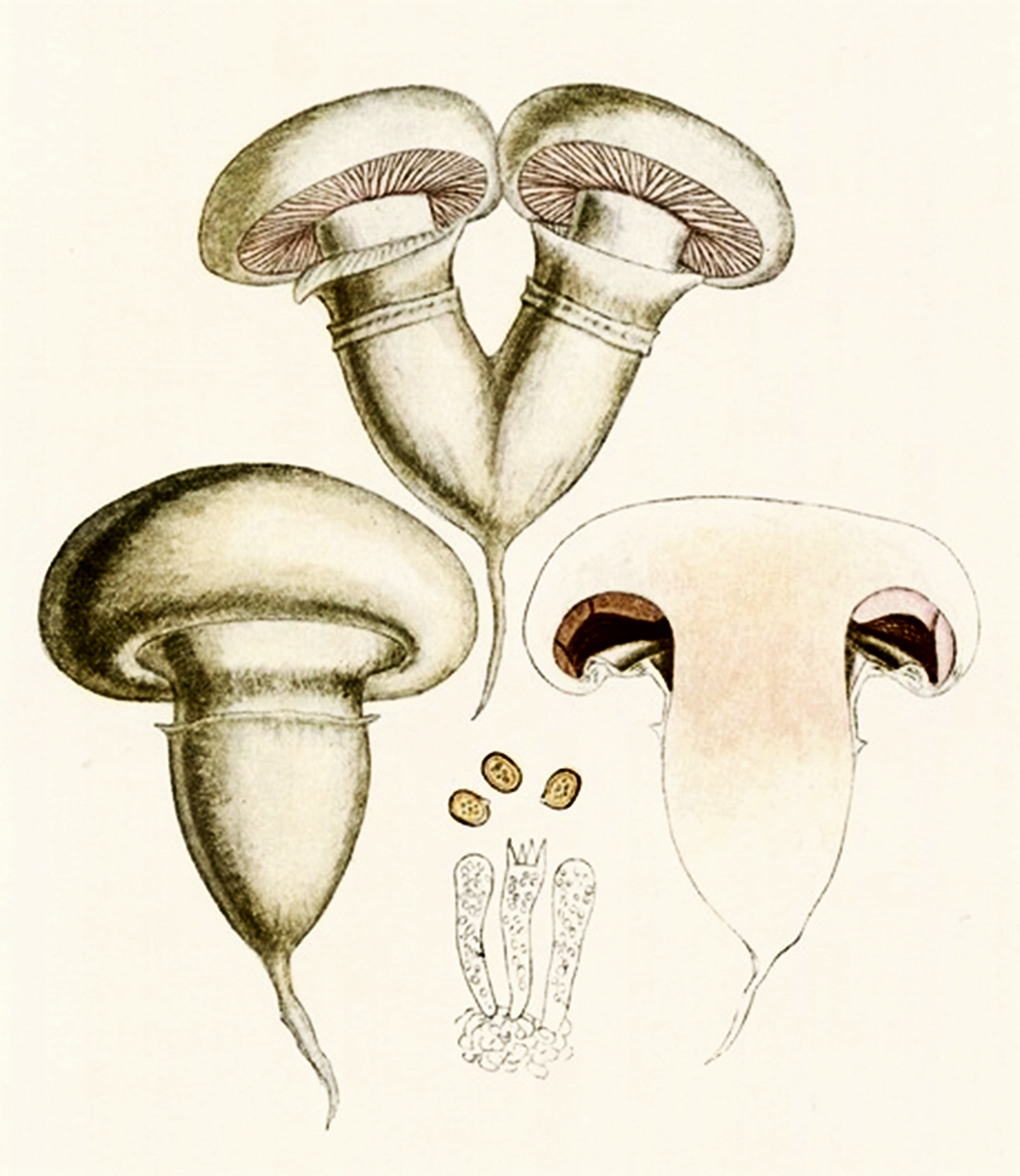 Giacomo Bresadola: Psalliota arvensis var. edulis Vittad., 1835 ex Bres., 1931), heute Agaricus bitorquis (Quél., 1884) Sacc. (1887)